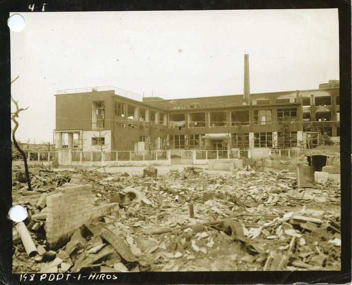 被爆後の広島逓信病院